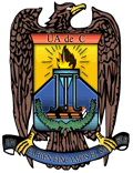 Escudo de la Universidad Autonoma de Coahuila